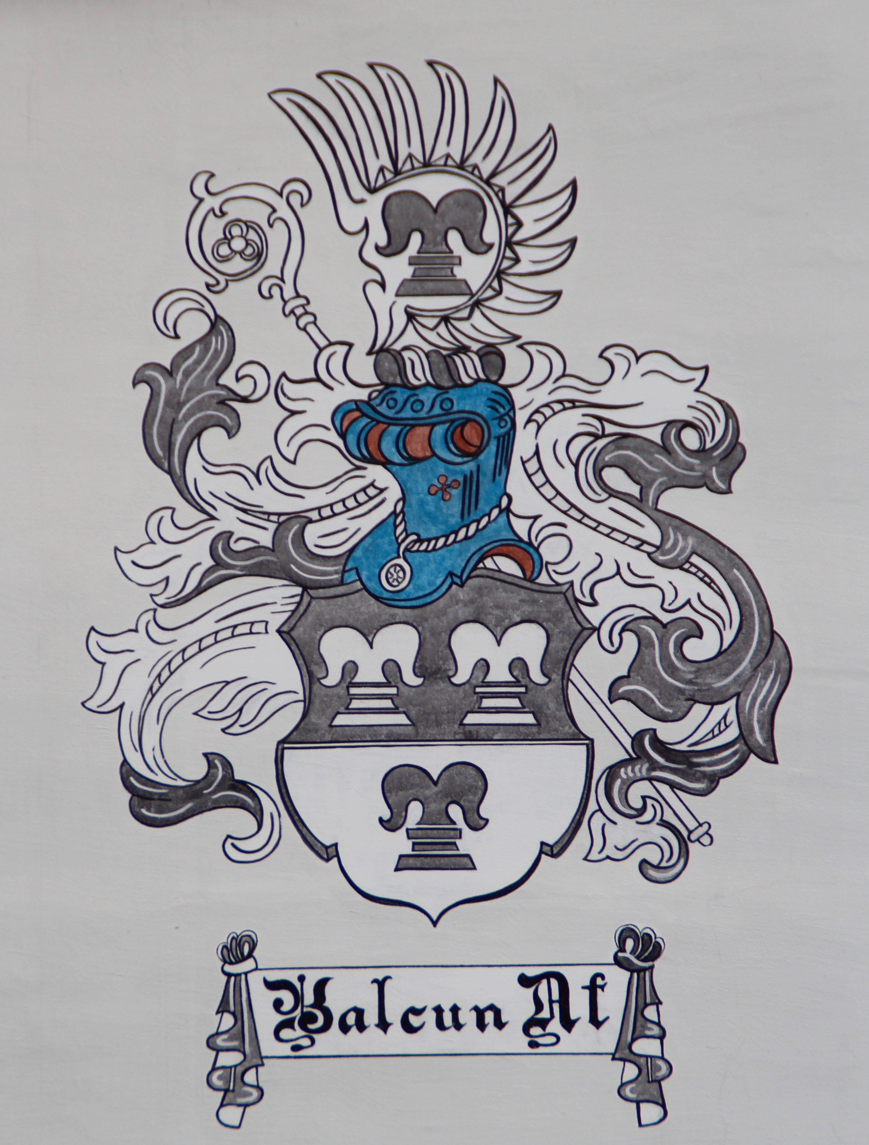 Wappen Balcun Al an einem Haus in Müstair